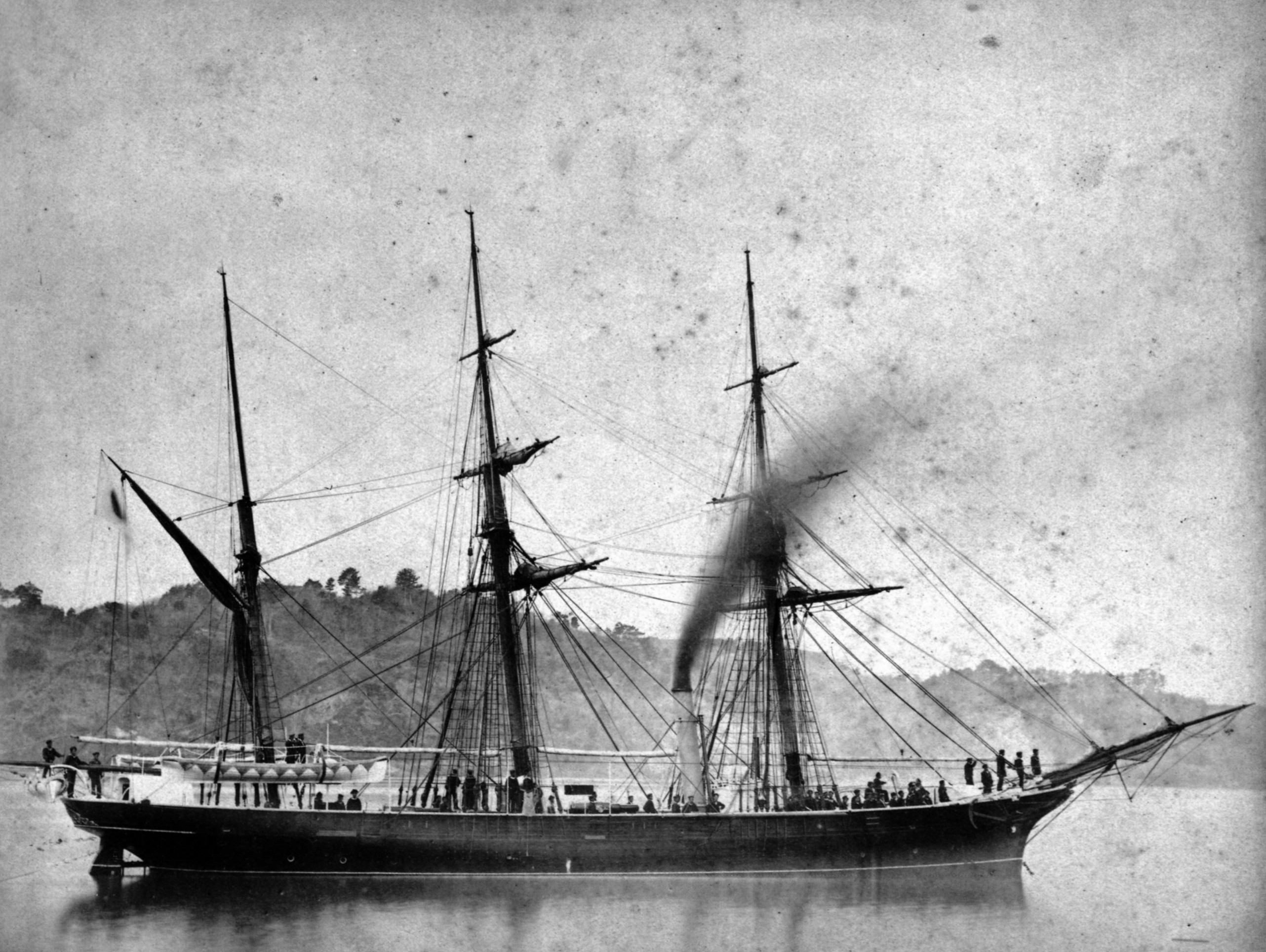 1878年頃、横須賀港での鳳翔